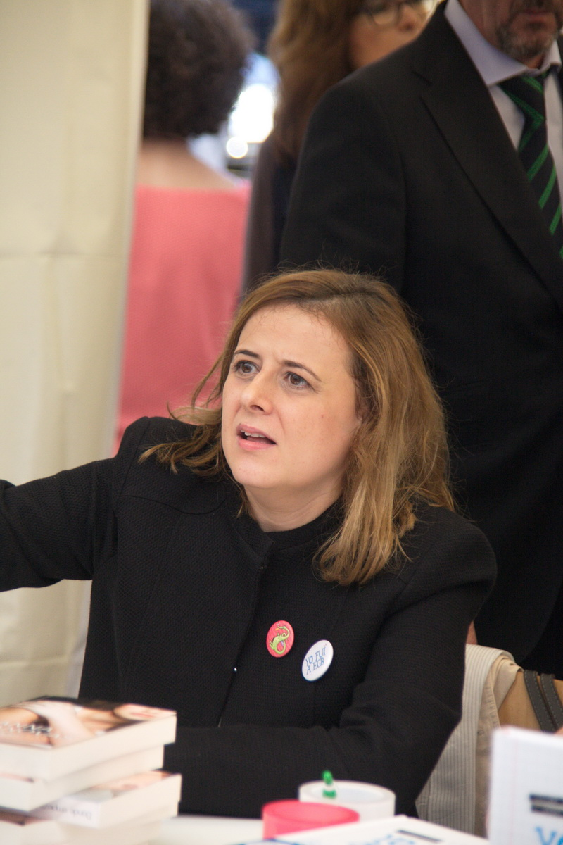 Anna Turró Casanovas. Diada de Sant Jordi 2015, signatura de llibres a Barcelona.